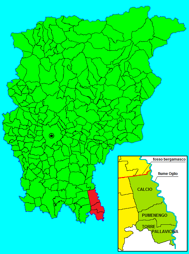 Mappa della Calciana, provincia di Bergamo, Italiy